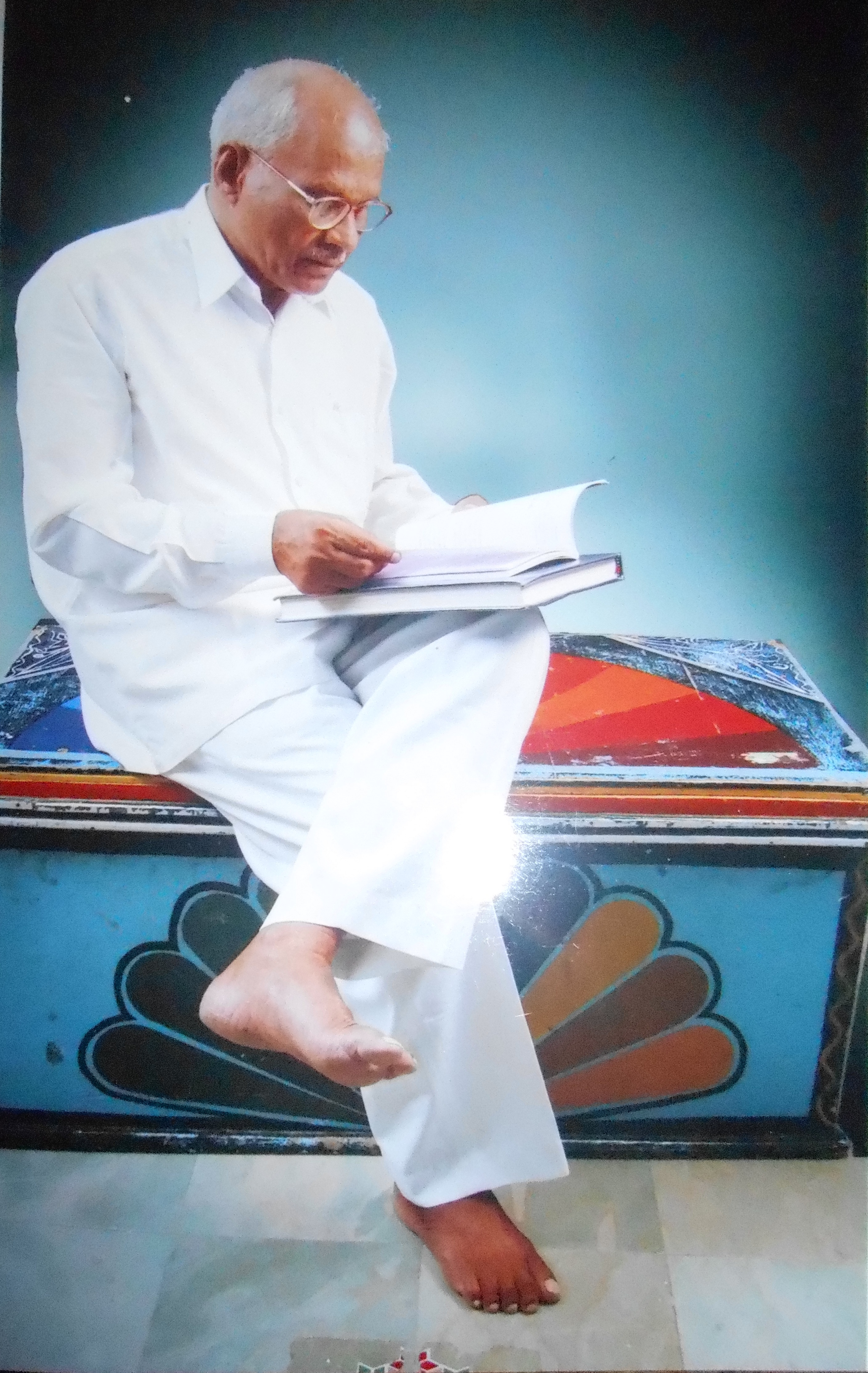 పుస్తక పఠనం చేస్తున్న ఆచార్య కూరెళ్ళ